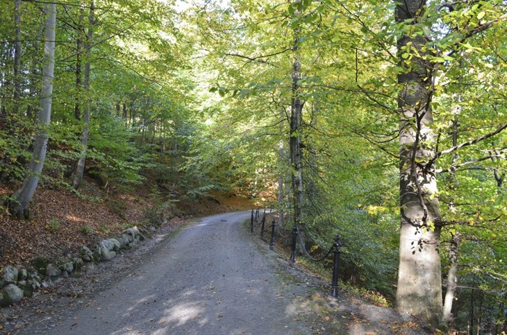 Grusvei gjennom løvskog